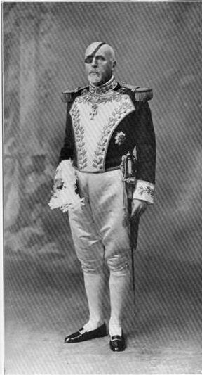 Ritratto del principe Alessandro Ruspoli, cameriere segreto di sua santità